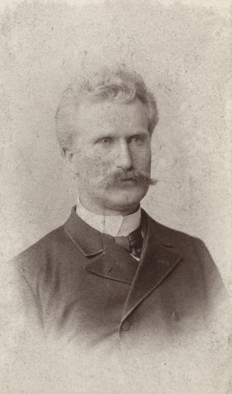 portrett, mann, arkitekt, vignettert brystbilde.